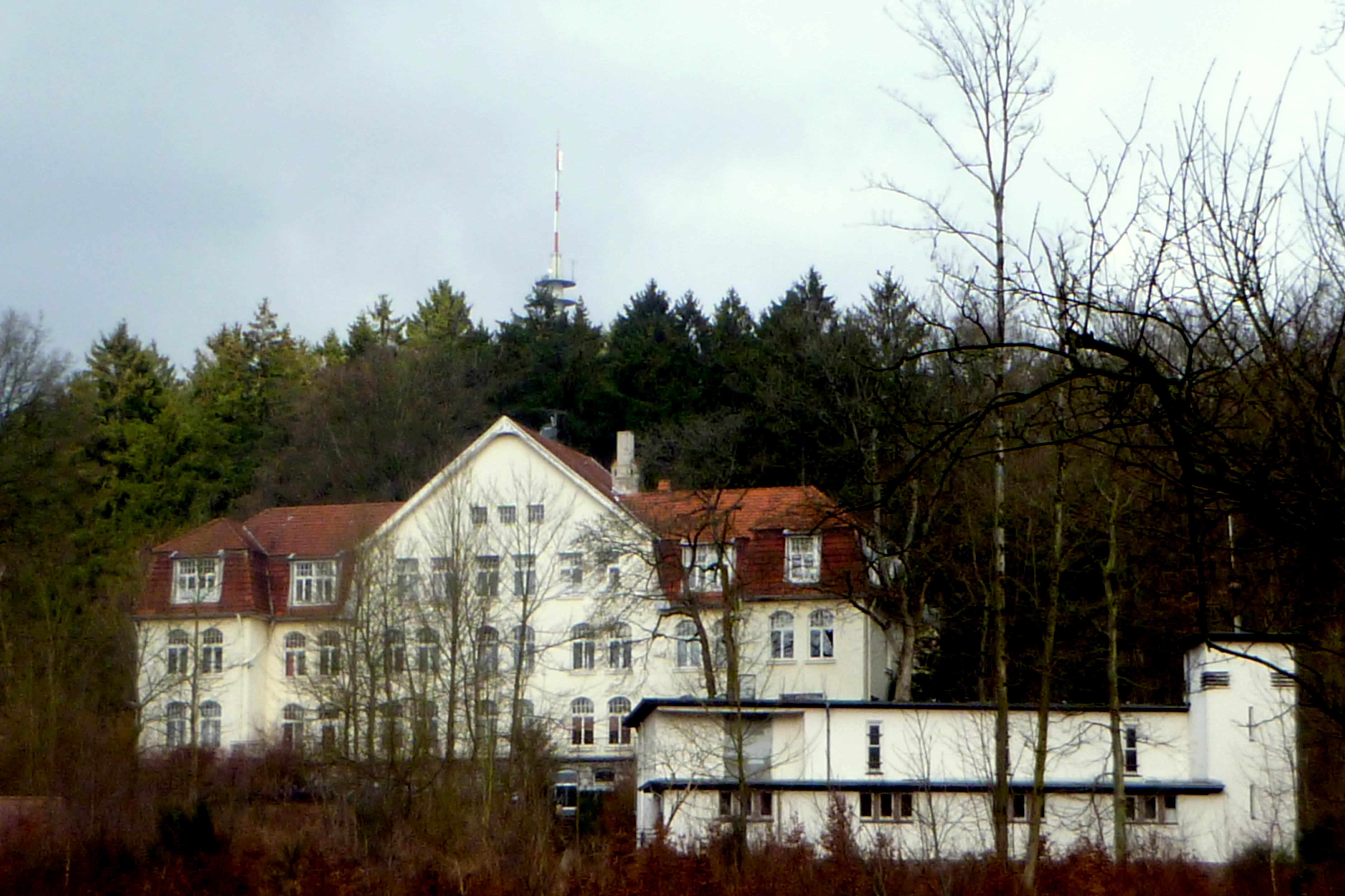 ehemaliges Kaiser-Wilhelm-Genesungsheim, jetzt Maria im Tann; unterer Backertsweg, Aachen, Baudenkmal in Aachen